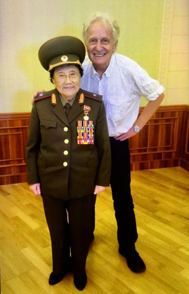 Uwe Kräuter mit einer in Nordkorea berühmten Generalin, 90 Jahre alt.